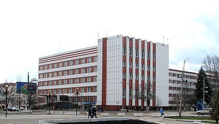 Балашовский филиал СГУ им.Чернышевского